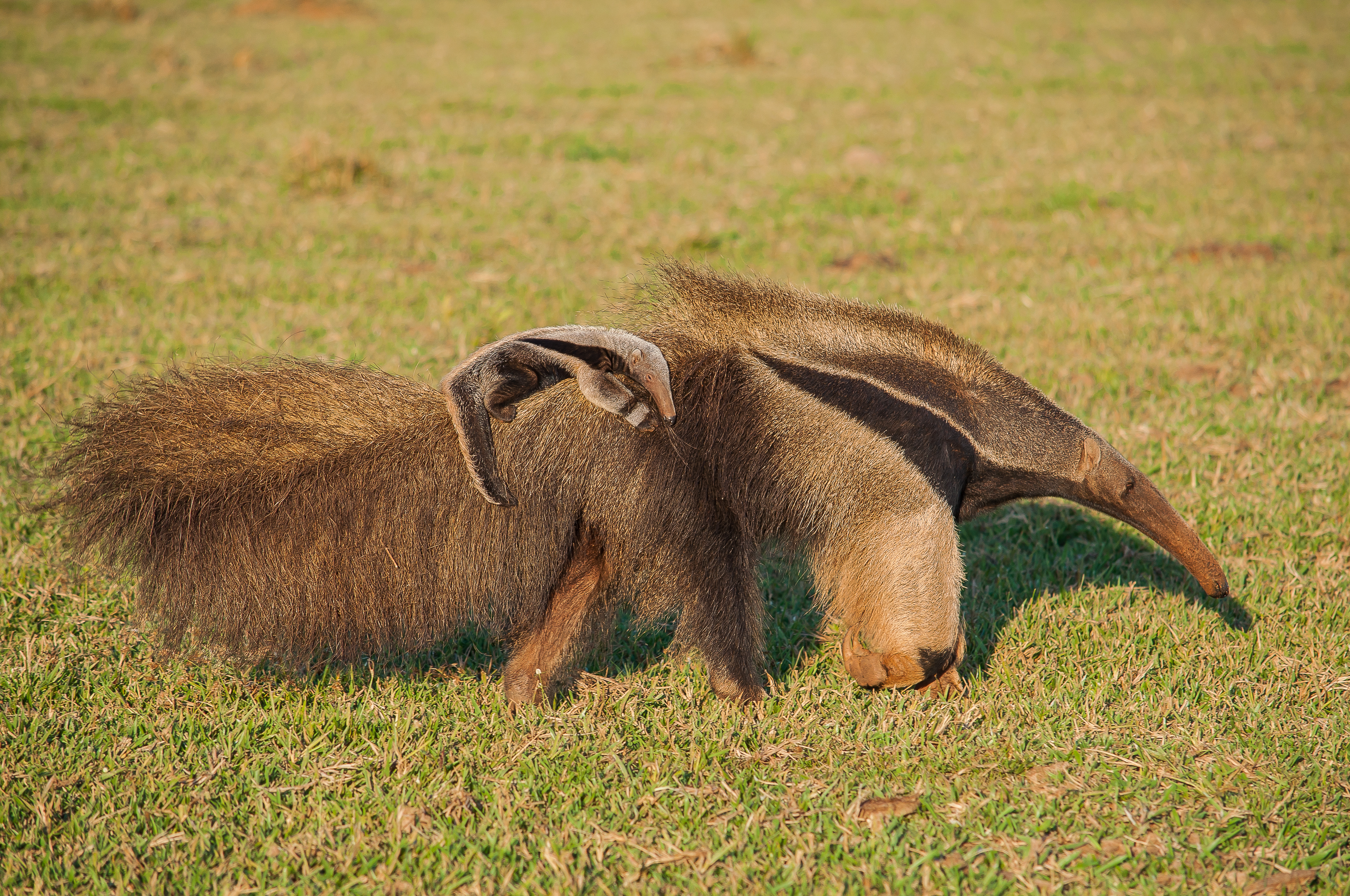 Tamanduá-bandeira com filhote, em fazenda na área rural de Campo Grande - MS.